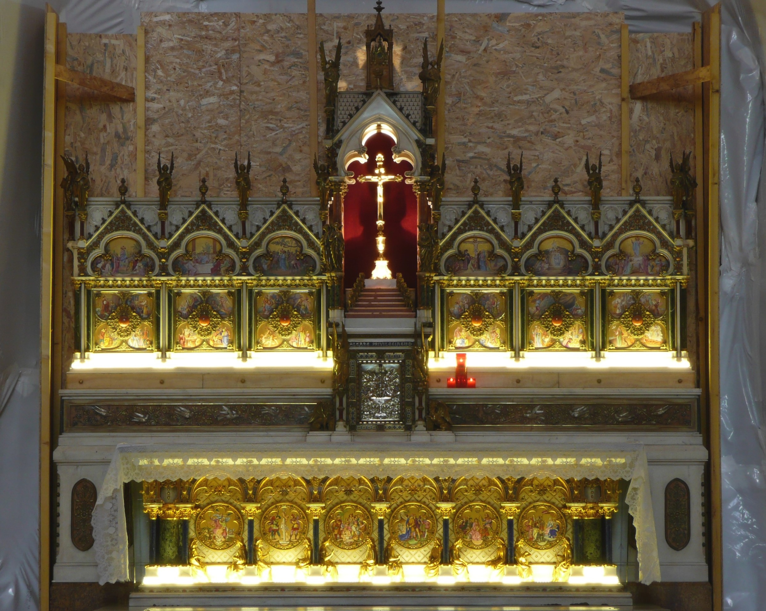 A Marseille (Bouches-du-Rhône_France), vers le sommet de la Canebière, église néo-gothique de Saint-Vincent-de-Paul dite des Réformés, le maître-autel dû au marbrier-sculpteur Jules Cantini.